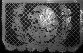 Bandera elaborada en papel de china con la figura del escudo nacional mexicano, elaborado a mano por artesanos del Distrito Federal